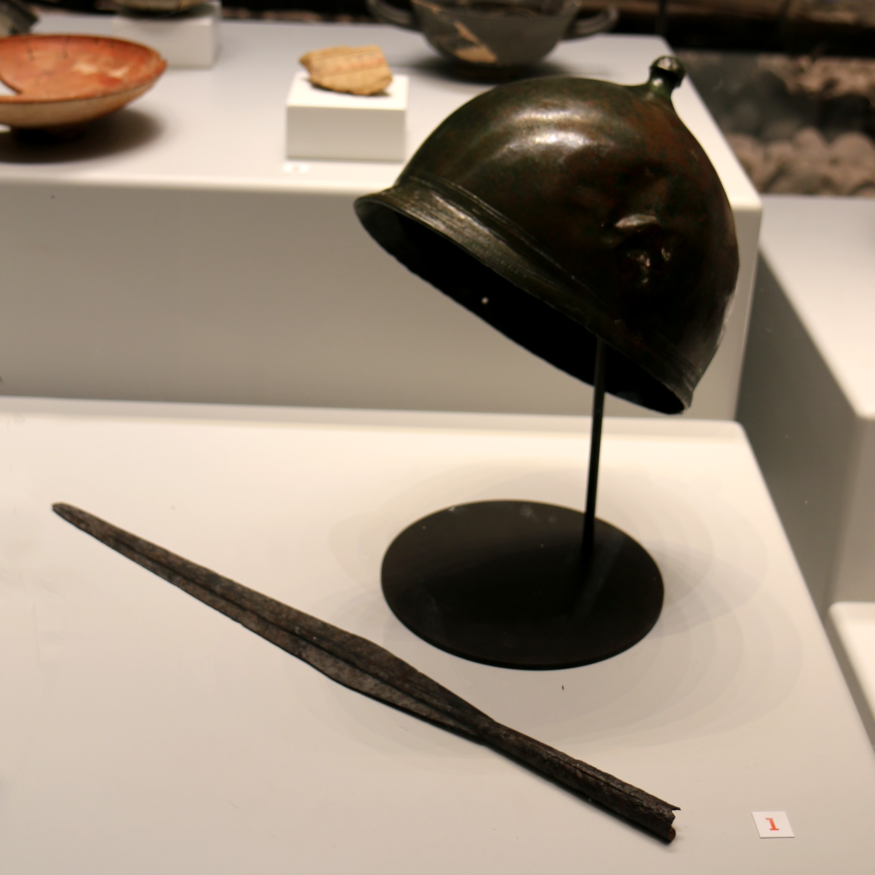 Casque en bronze du I° siècle av. J.-C. et pointe de lance trouvés à l'oppidum du Baou Roux à Bouc Bel Air près de Marseille et exposés au musée d'histoire de Marseille.